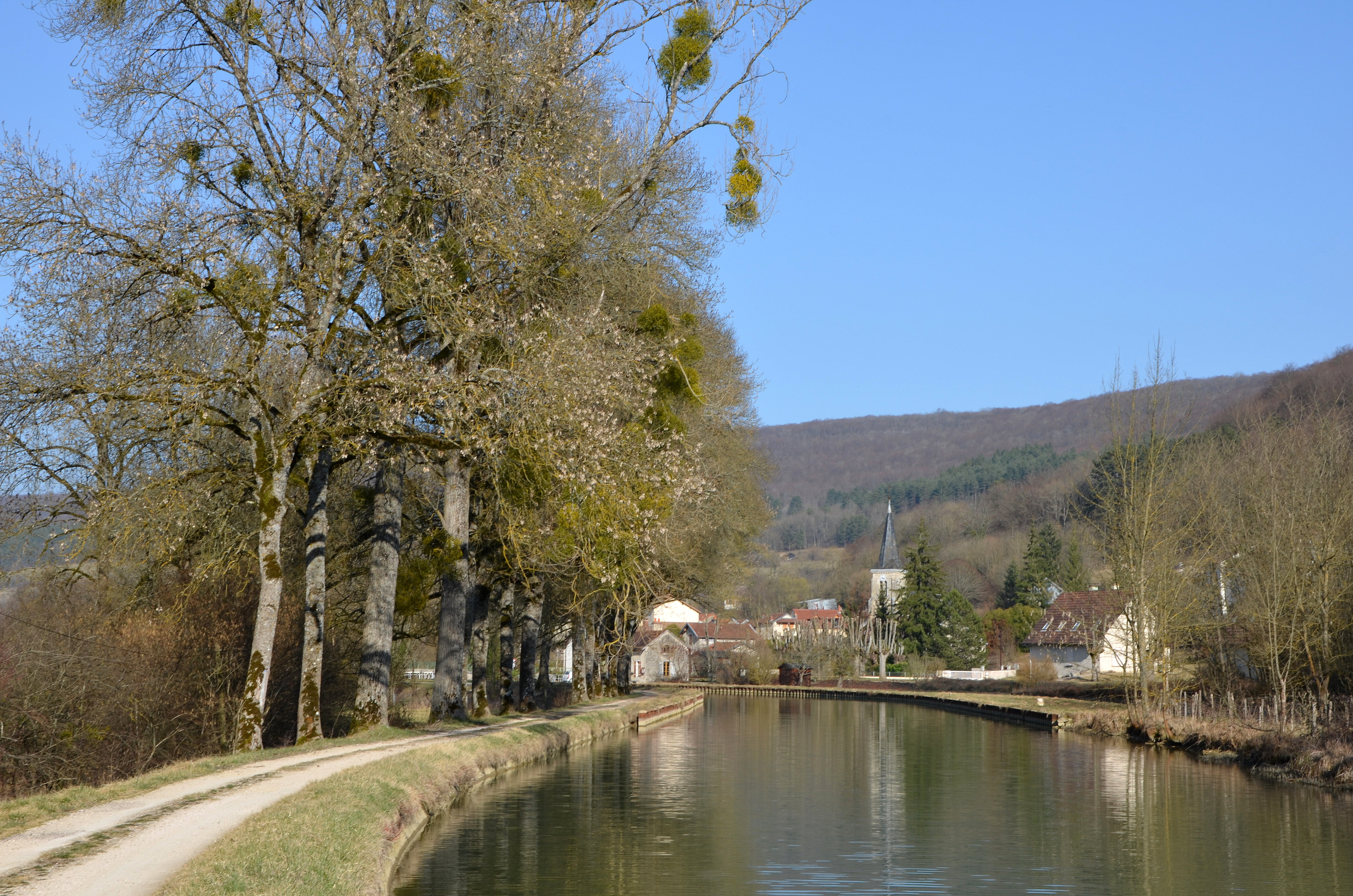 Canal de Bourgogne au niveau de Saint Victor sur Ouche, Cote d'Or, Bourgogne, France